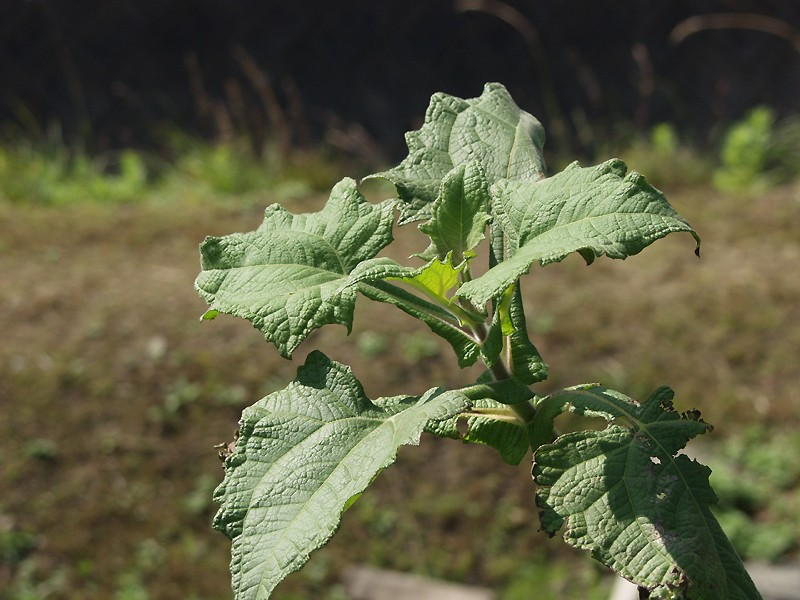 ヤーコン(Smallanthus sonchifolius)撮影場所：鬼北町